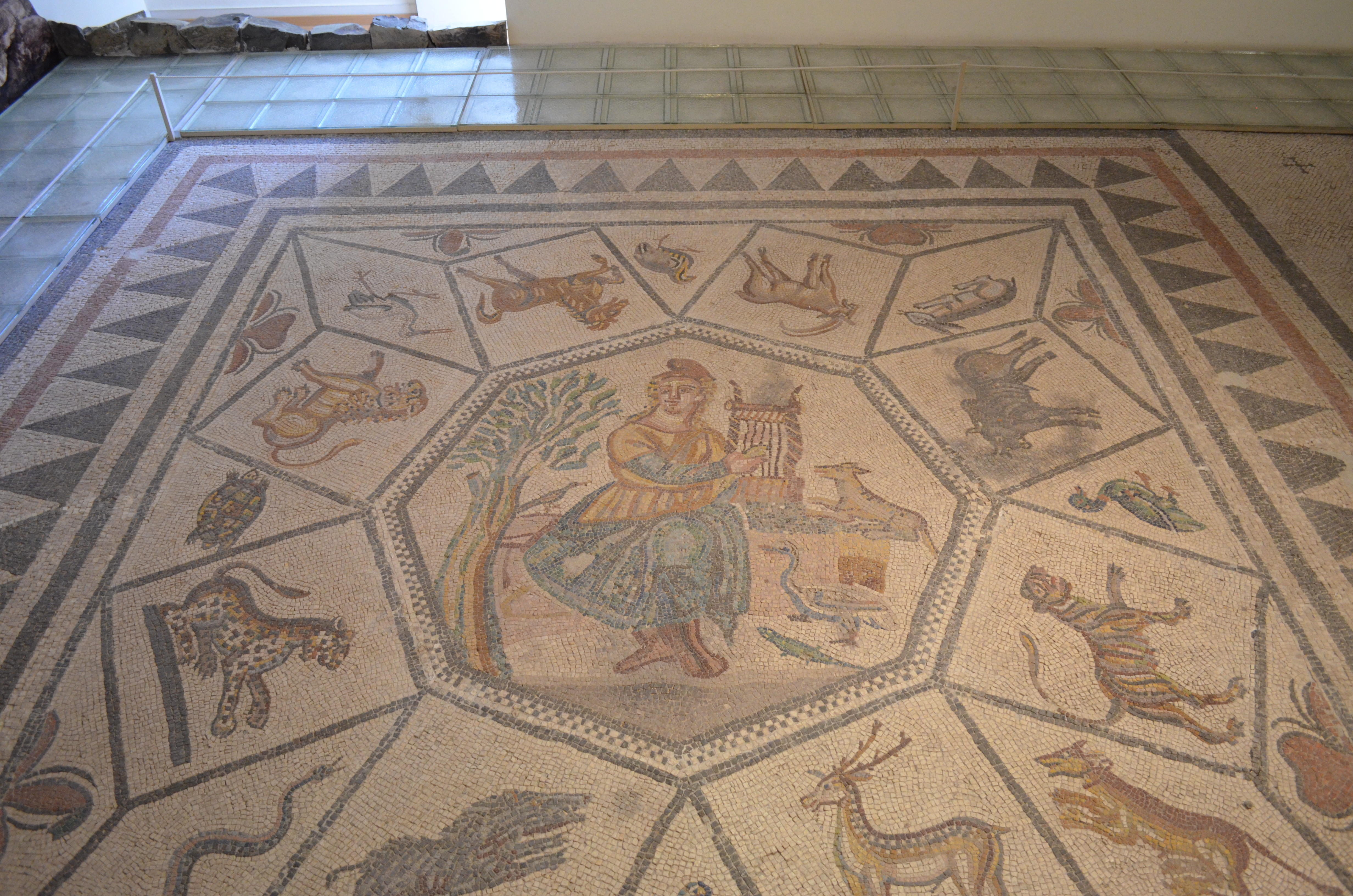 Ein Bodenmosaik aus dem "Haus des Menanders" das Orpheus mit seiner Lyra darstellt. Das Haus stammt aus der Spätantike und stand in der Nähe des Amphitheaters in Mytilini.